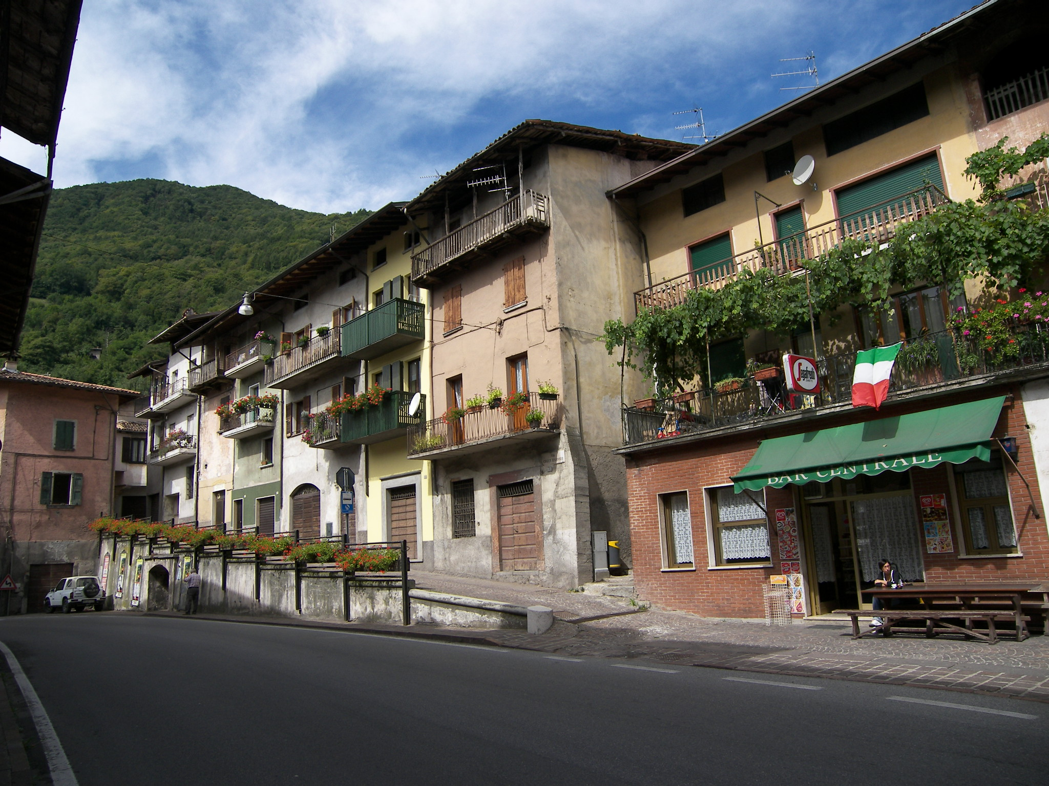 Lavenone (BS)